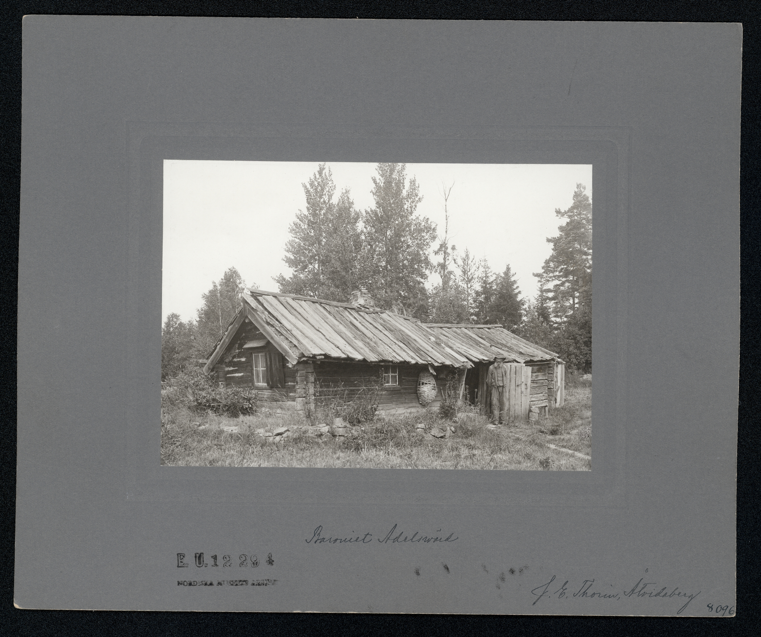 Ryggåsstuga med ägaren framför dörren. Falla, Åtvids sn., Östergötland.